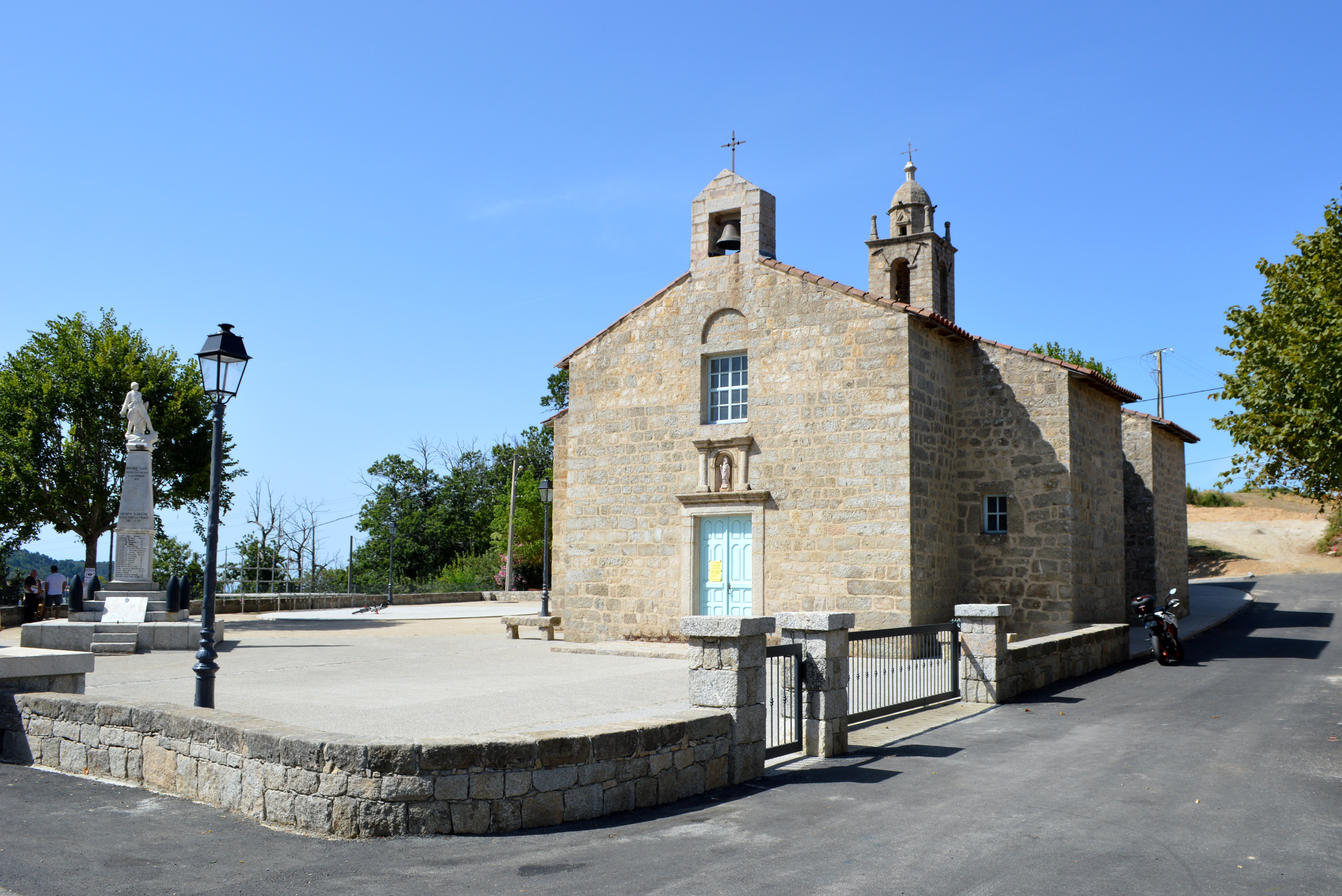 Place et église du village corse d'Aullène